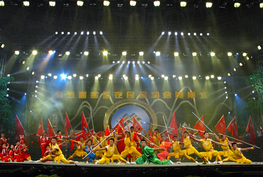 中华人民共和国第五届全国农民运动闭幕式